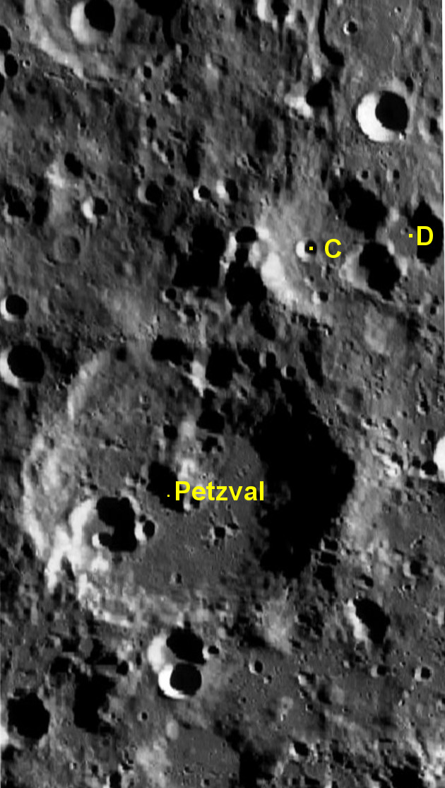 Cráter lunar Petzval. Cráteres satélite. (Imagen LRO)